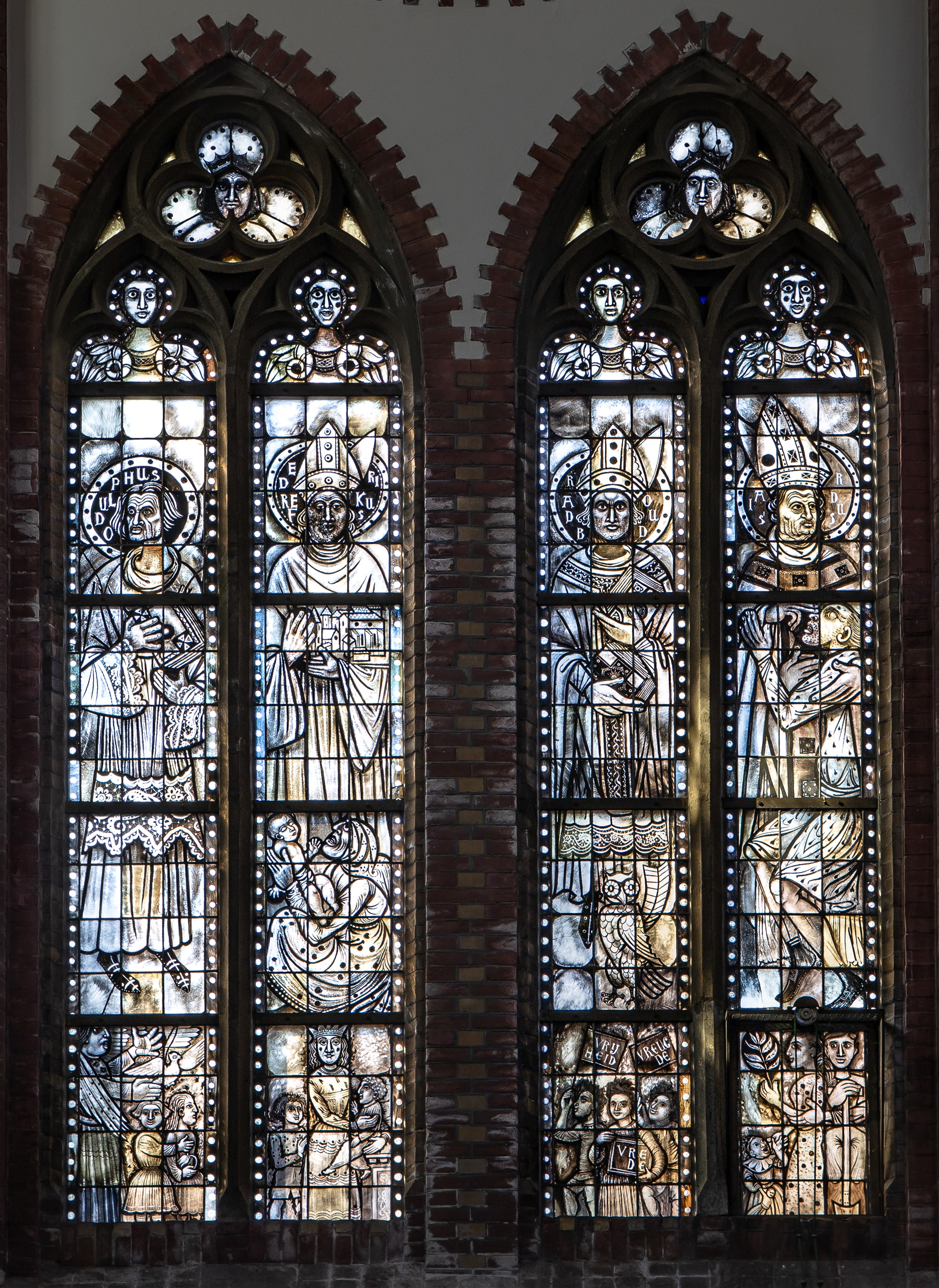 Friese heiligen in gebrandschilderd raam, St Nicolaasga